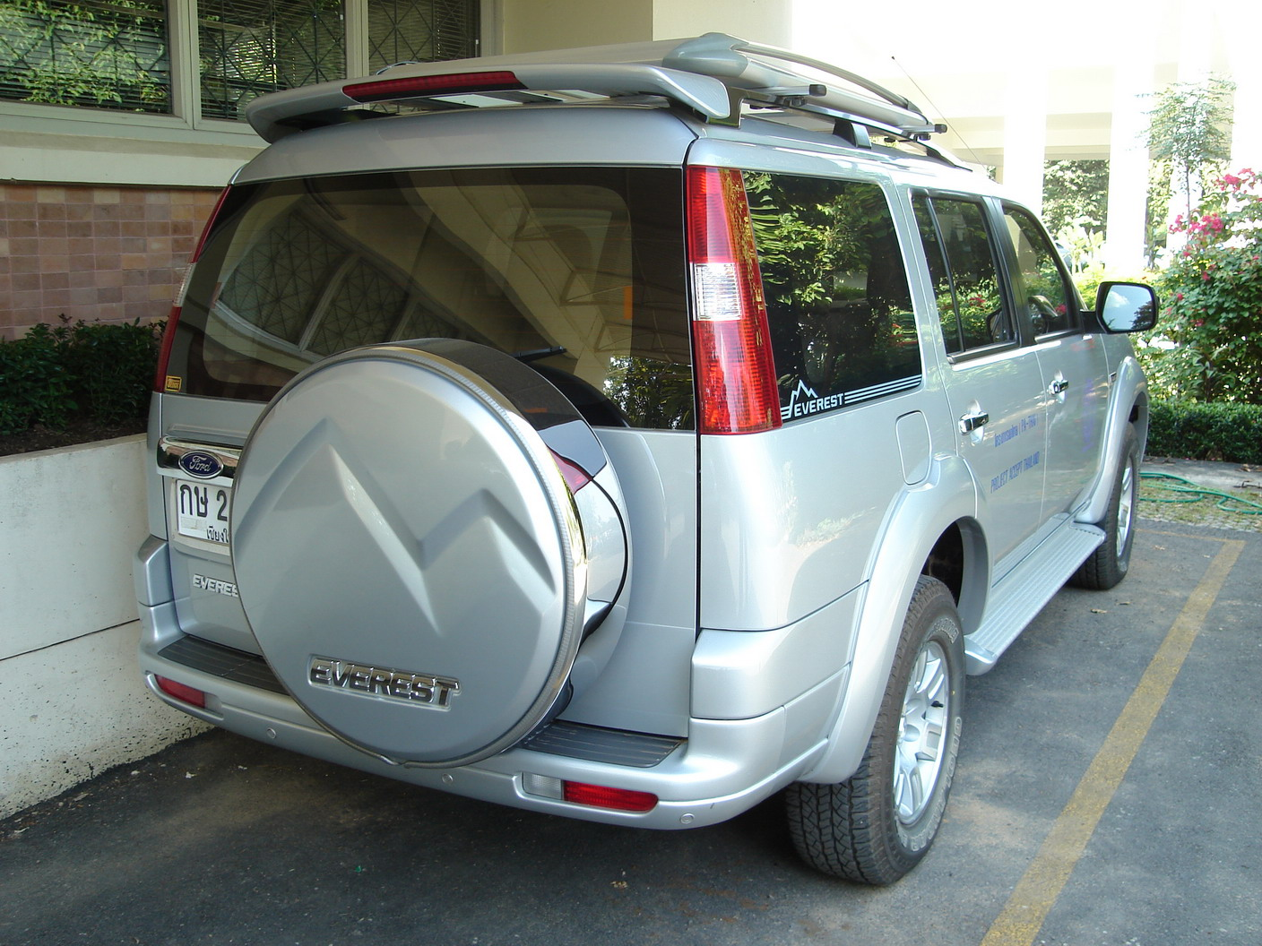 Ford Everest (2nd generation)